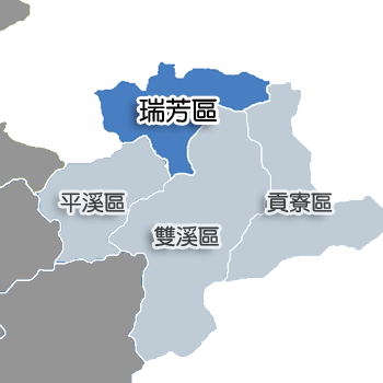 瑞芳區相對位置。